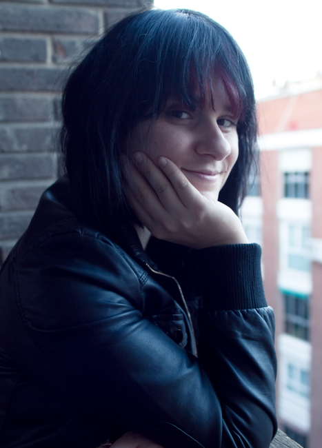 Fotografía de Henar Torinos, por Tania Navas.